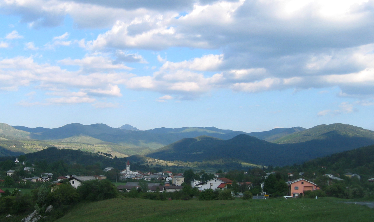 Knežak, town in Slovenia